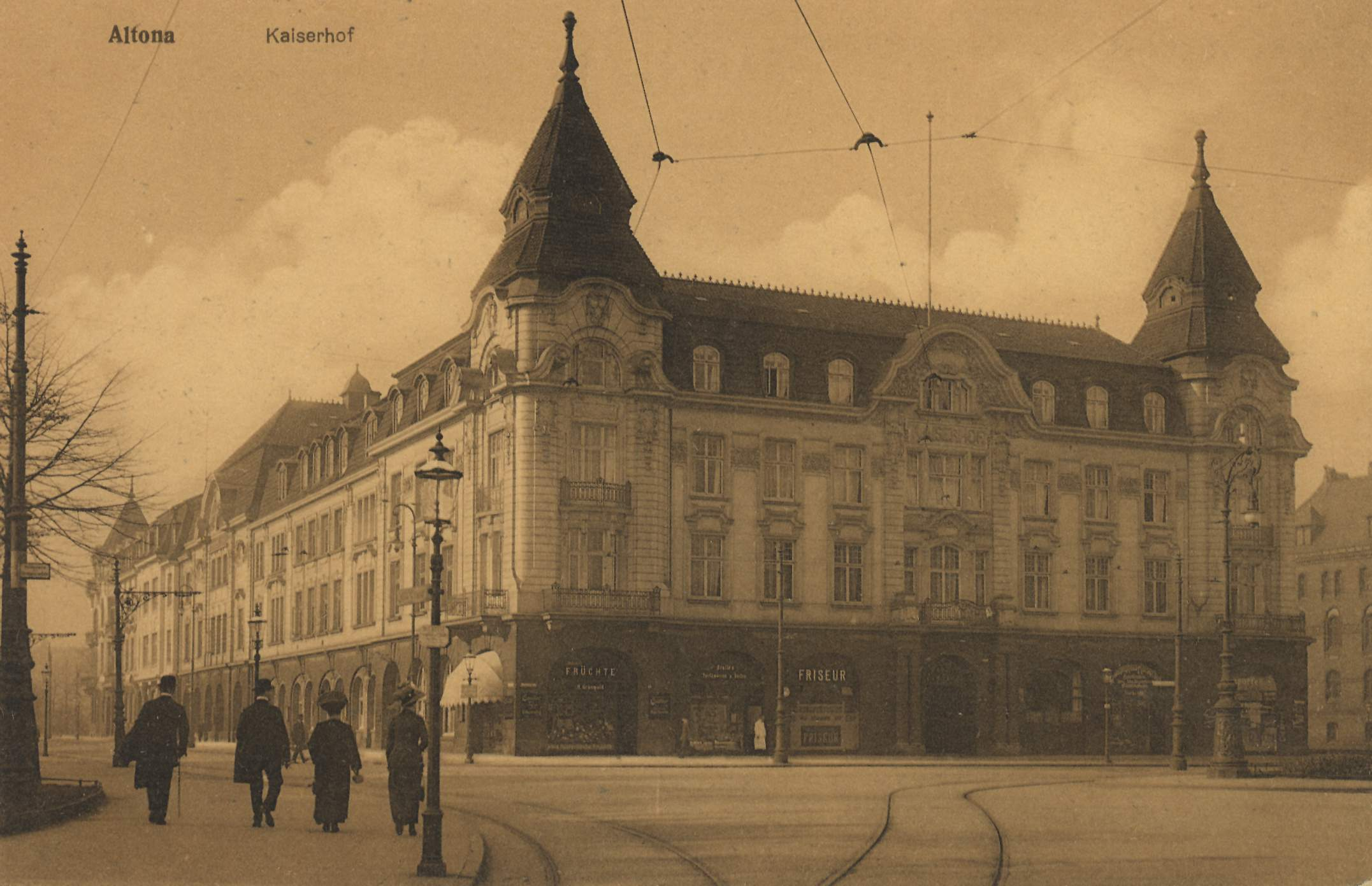 Kaiserhof